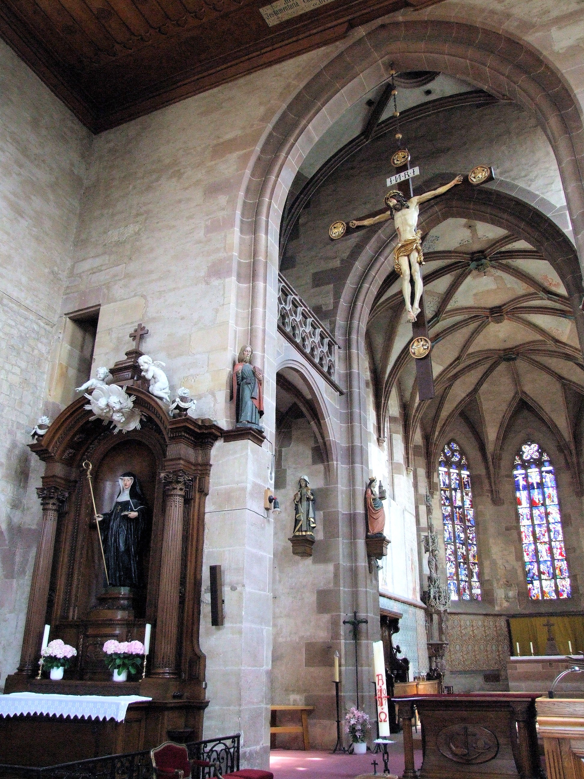 Walbourg - Eglise Sainte-Walburge - Autels et chœur